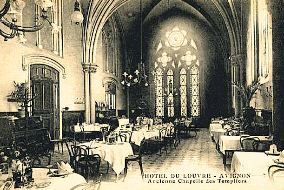 Salle de restaurant de l'Hôtel du Louvre d'Avignon installée dans l'ancienne chapelle de l'Ordre du Temple